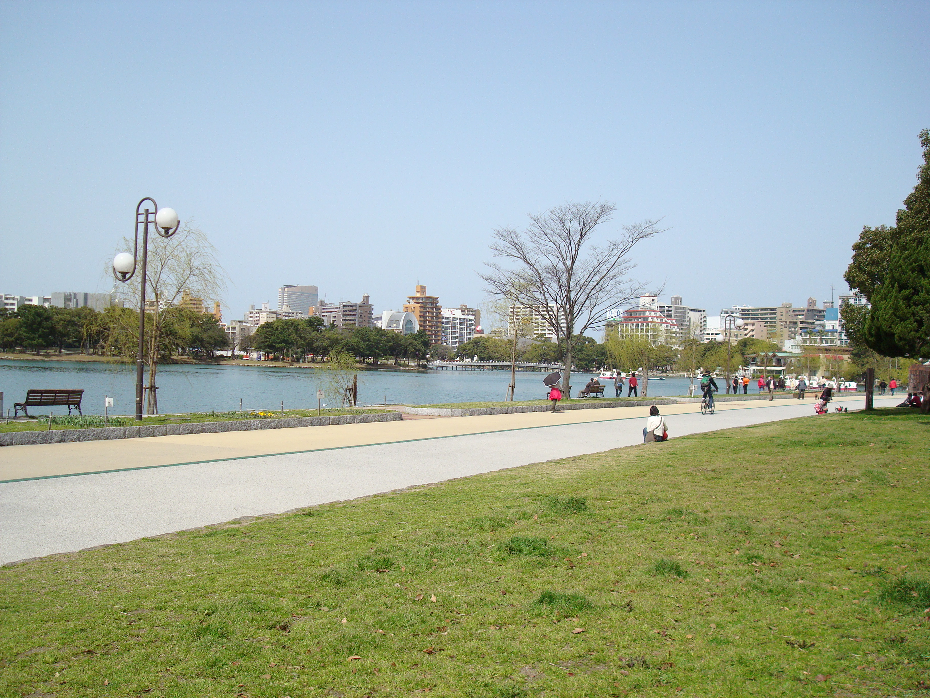 Ohori Park